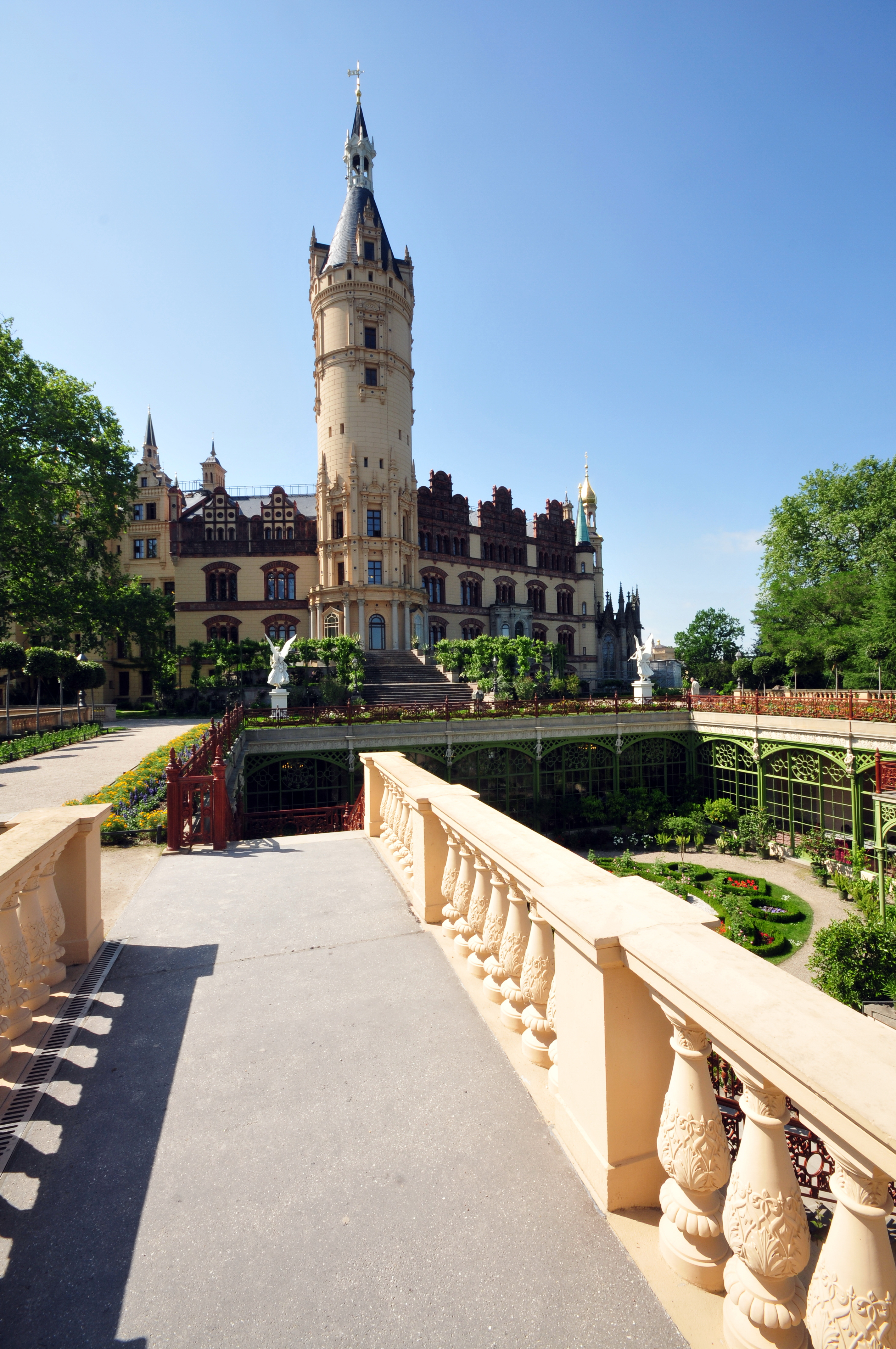 Schweriner Schloß; Orangerie und Schloßgarten